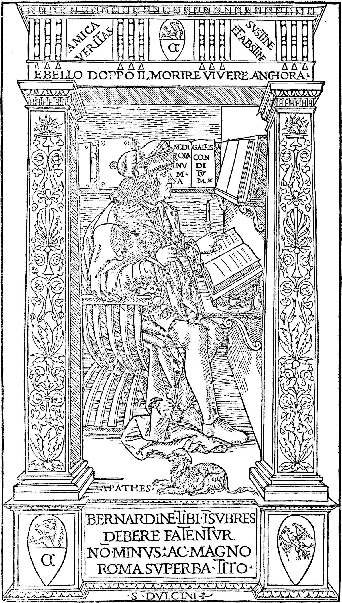 Xilografia in "Patria Historia" di Bernardino Corio, Milano, Alessandro Minuziano, 1503